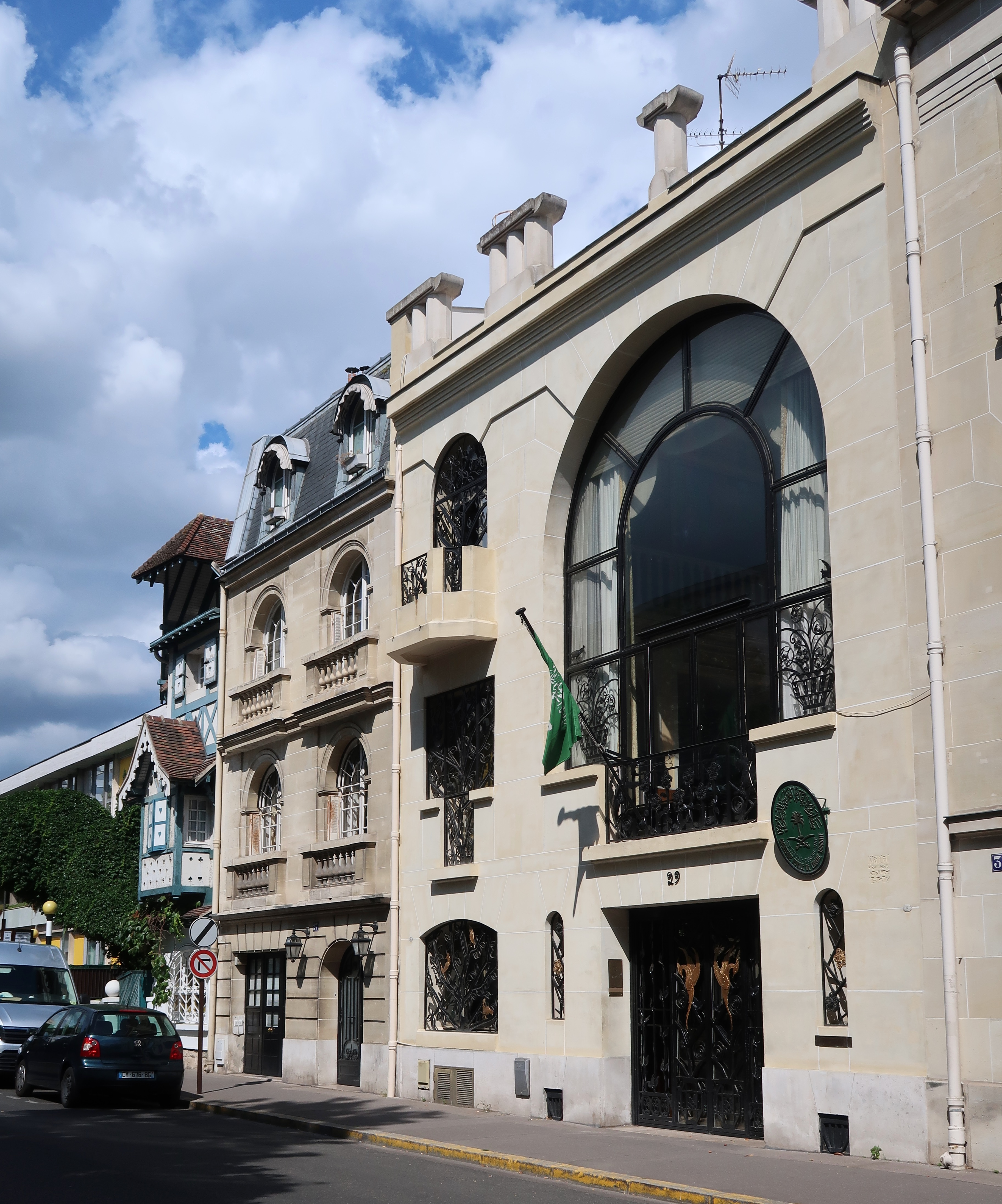 Consulat d'Arabie saoudite, 29 rue des Graviers à Neuilly-sur-Seine (Hauts-de-Seine).